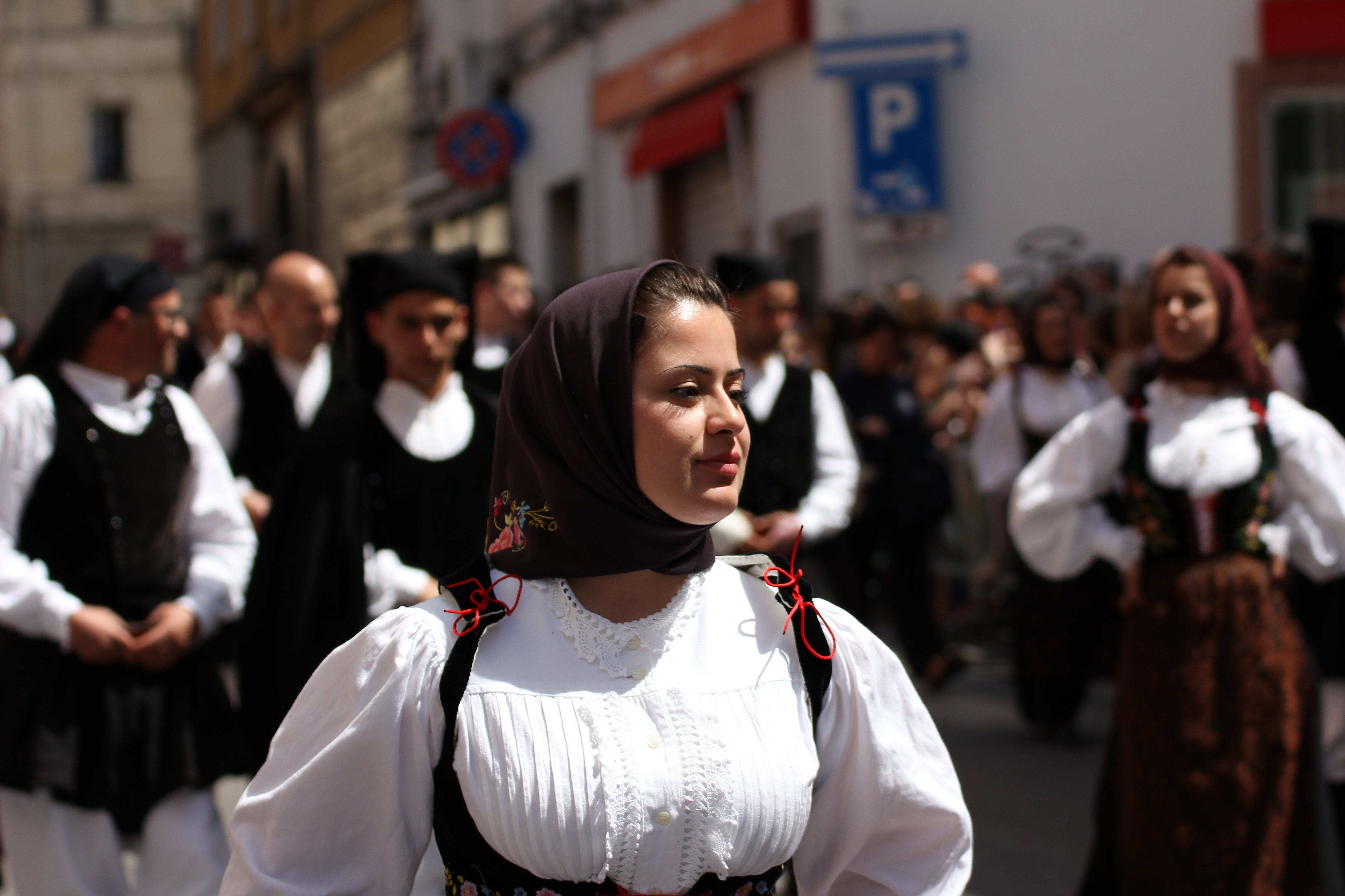 Costume tradizionale